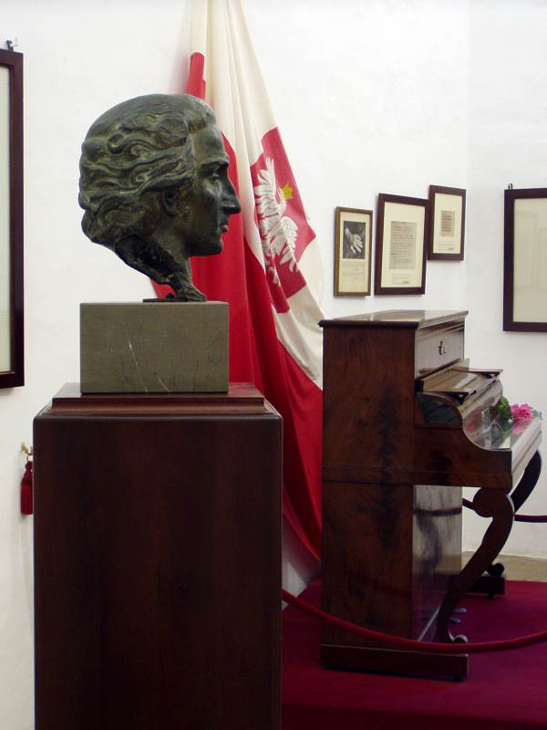 Ekspozycja dotycząca Fryderyka Chopina w klasztorze kartuzów w Valldemosa na Majorce.